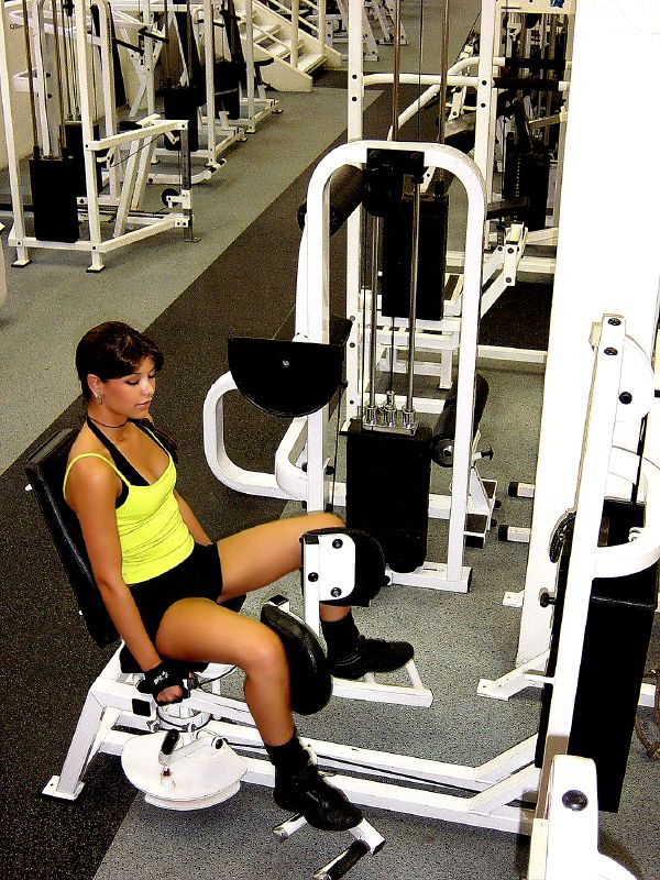 A modelo e apresentadora de TV brasileira Amanda Françozo.